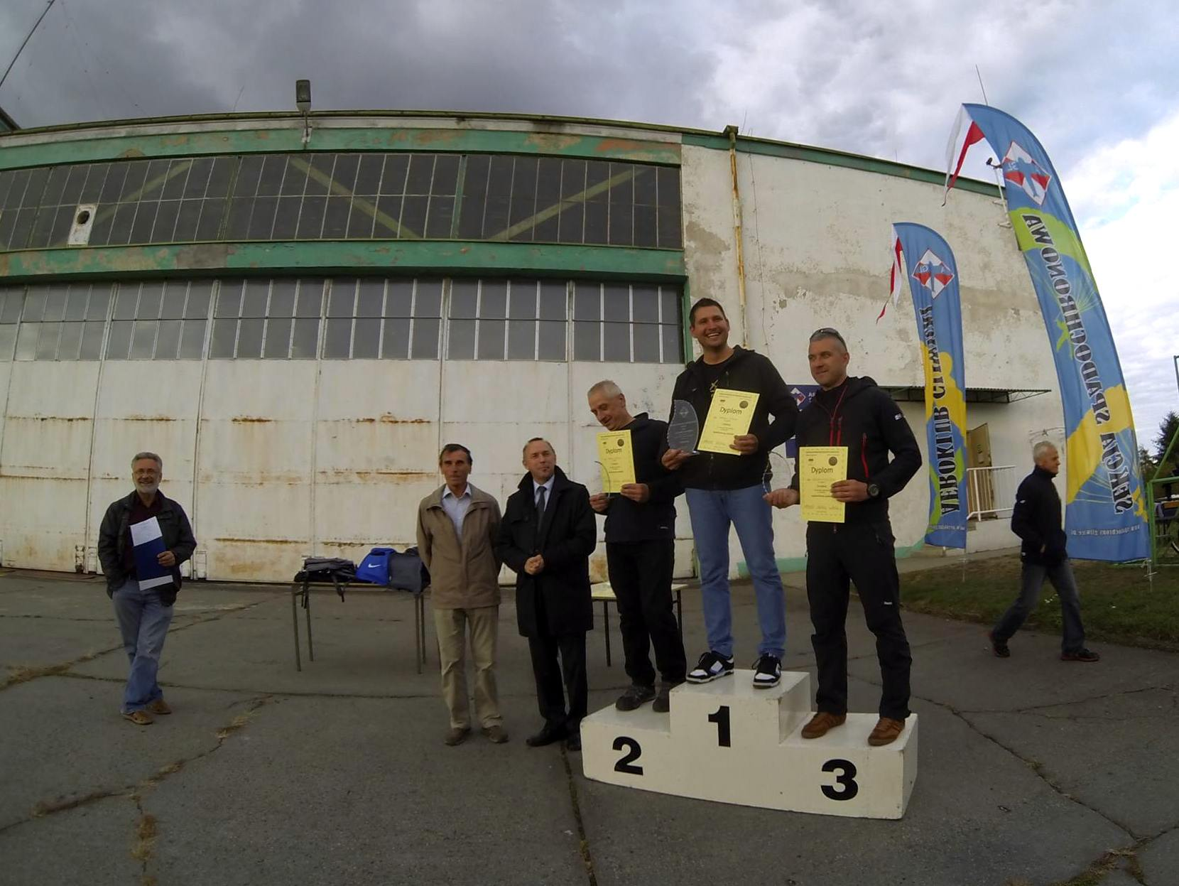 Spadochronowe Mistrzostwa Śląska 2015, zwycięży kategorii spadochrony szybkie: I miejsce – Tymoteusz Tabor, II miejsce – Mariusz Bieniek, III miejsce – Krzysztof Zieliński. Od lewej stoją: 1. Ryszard Ptaszek (Szef wyszkolenia Aeroklubu Gliwickiego), 2. Jan Isielenis (Kierownik sportowy Mistrzostw), 3. Bogdan Traczyk (Prezes Zarządu Aeroklubu Gliwickiego). Po prawo w głębi Józef Łuszczki